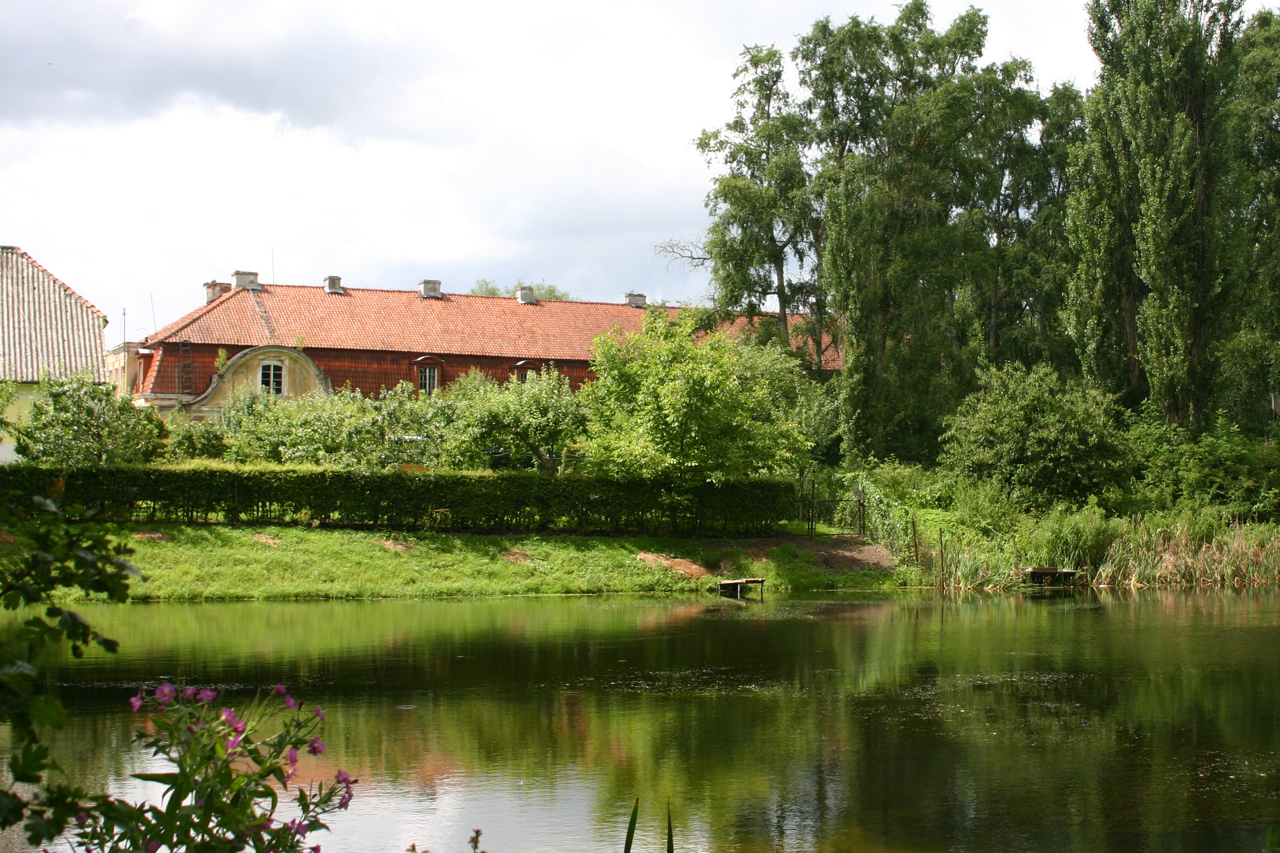 Wielewo (deutsch Willkamm) ist ein Dorf in Polen in der Wojewodschaft Ermland-Masuren. Das Dorf ist Teil des Schulzenamtes (sołectwo) Aptynty in der Gemeinde Barciany und gehört zum Powiat Kętrzyński.